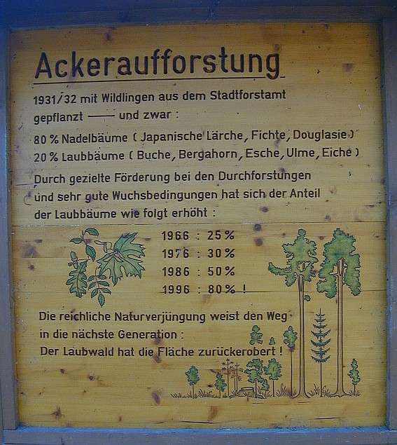 Schautafel Naturschutzgebiet Schweineberg (Hameln) - Deutschland